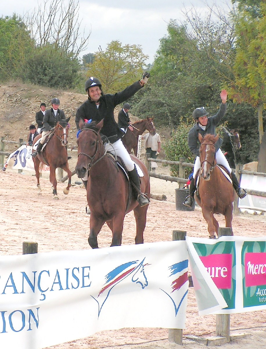 Tour d'honneur des vainqueurs d'une épreuve des championnats de France de 4e catégorie de saut d'obstacles à Niort en septembre 2004 Auteur : Karlyne